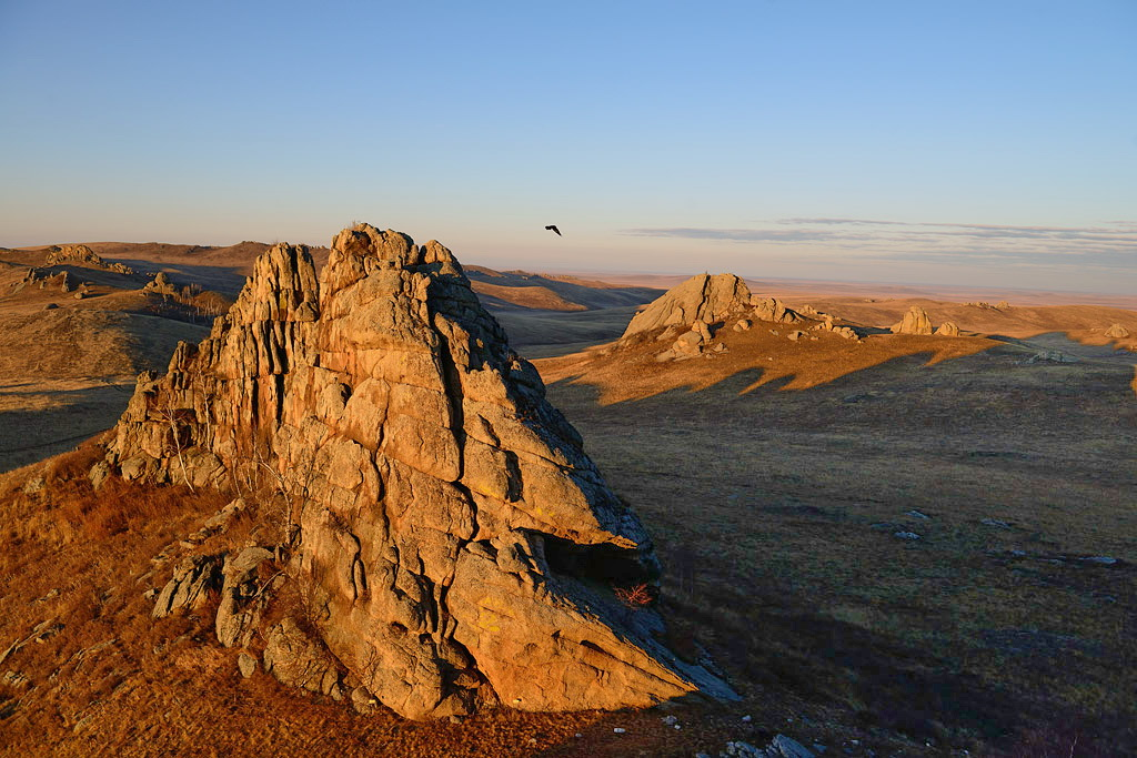 Даурский заповедник. Участок Одон-Челон